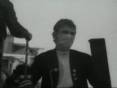 In Amsterdam werden de Mobiele eenheden van de politie ondersteund door materieel van de genietroepen en eenheden van de Koninklijke Marechaussee bij de ontruiming van een kraakpand aan de Vondelstraat. De hoge barricades die de krakers hadden opgeworpen, werden door genietanks van de Koninklijke Landmacht doorbroken. SHOTS: krakers werpen barricades op met stoeptegels en bouwketen.